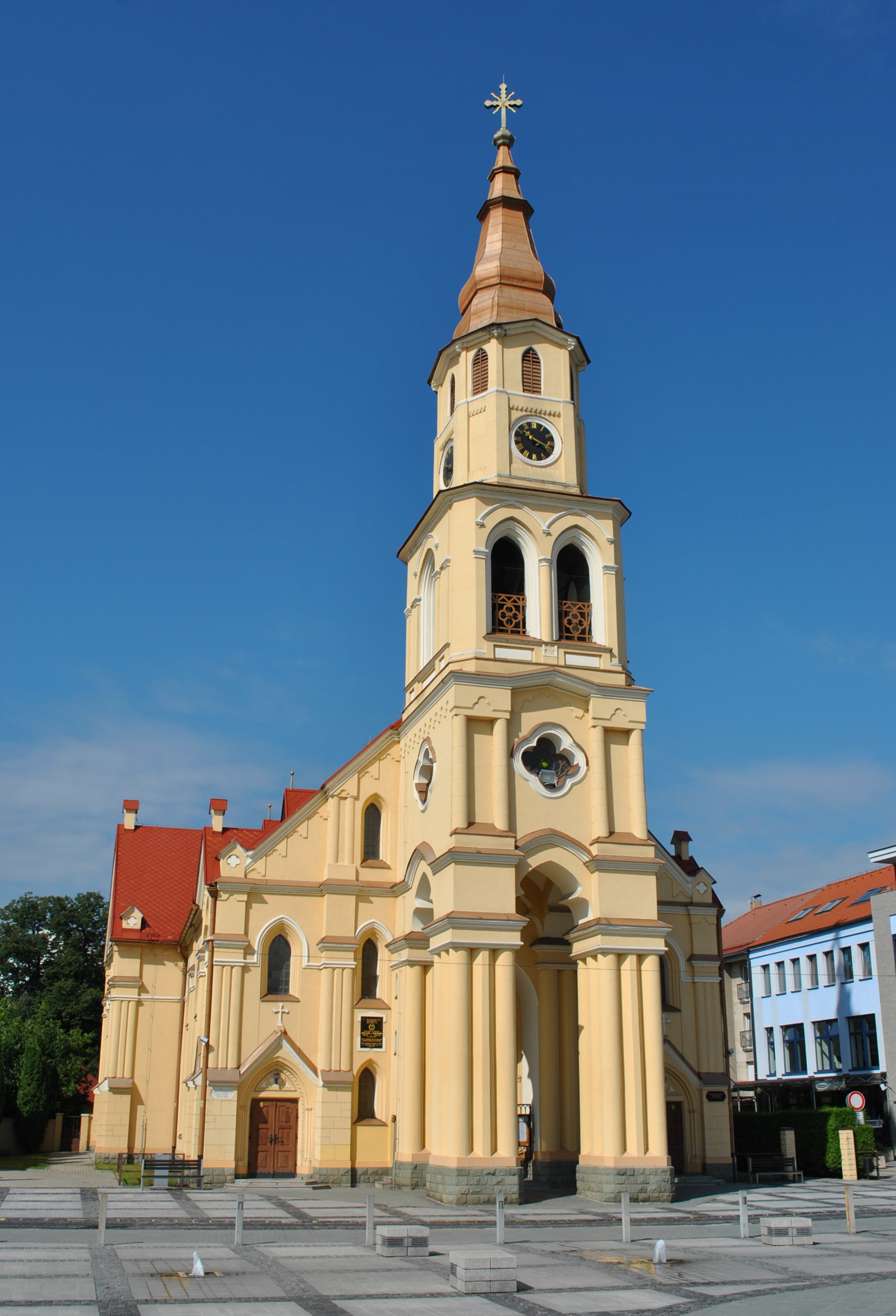 Zvolen - evanjelický kostol - stav k augustu roku 2015